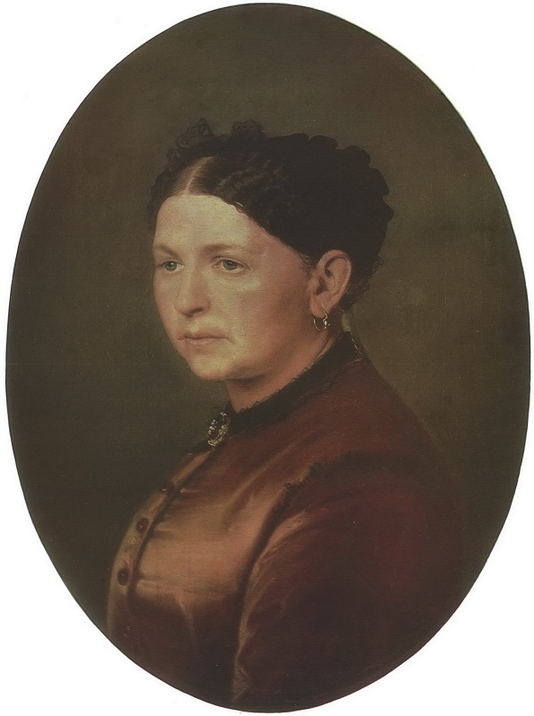 Портрет Ф.И. Резановой